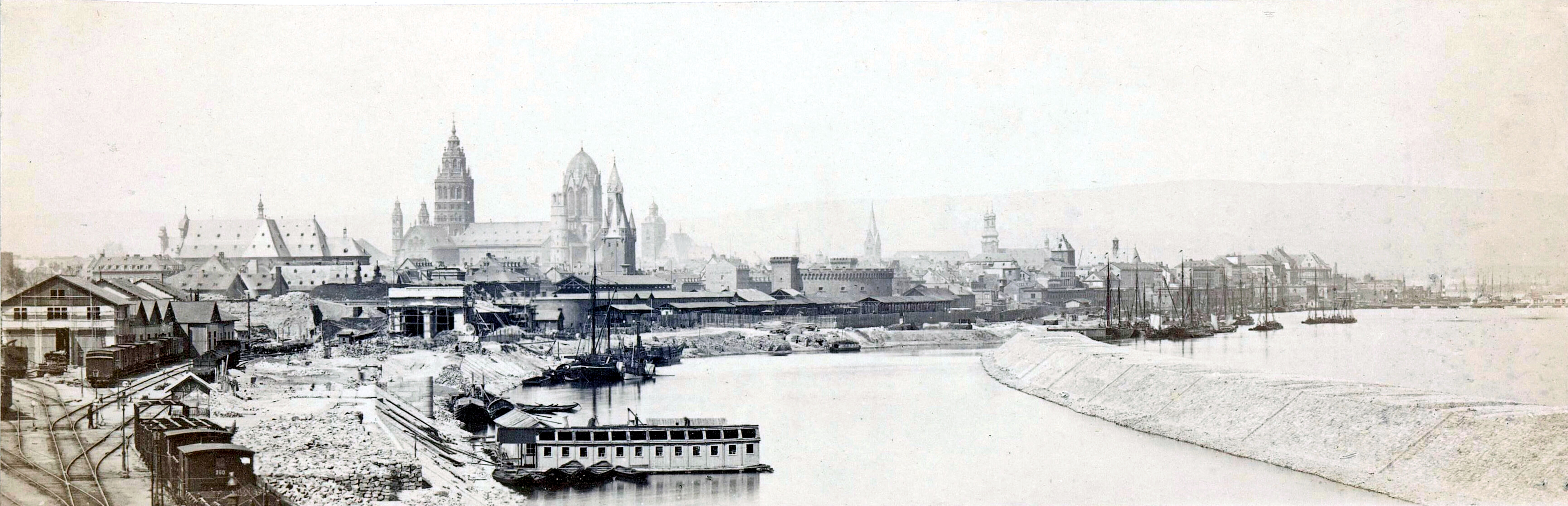 Mainz-Altstadt, Hafenanlagen und Stadtansicht. Der Winterhafen um 1867.